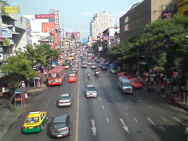 ถนนราชวิถีมองจากมุมสูง